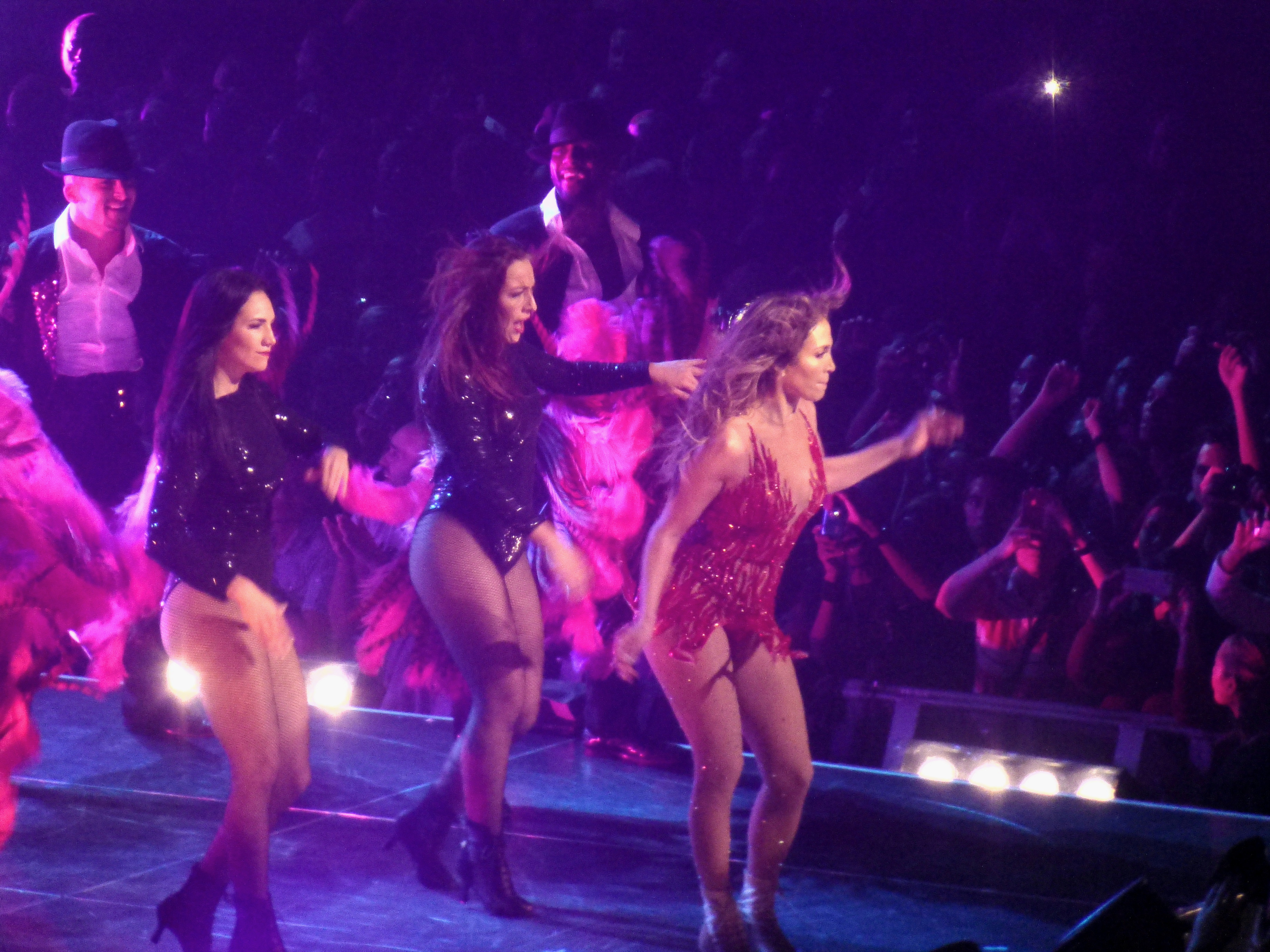 Jennifer LOPEZ en concert à Paris Bercy dans le cadre du " DANCE AGAIN WORLD TOUR " en OCTOBRE 2012